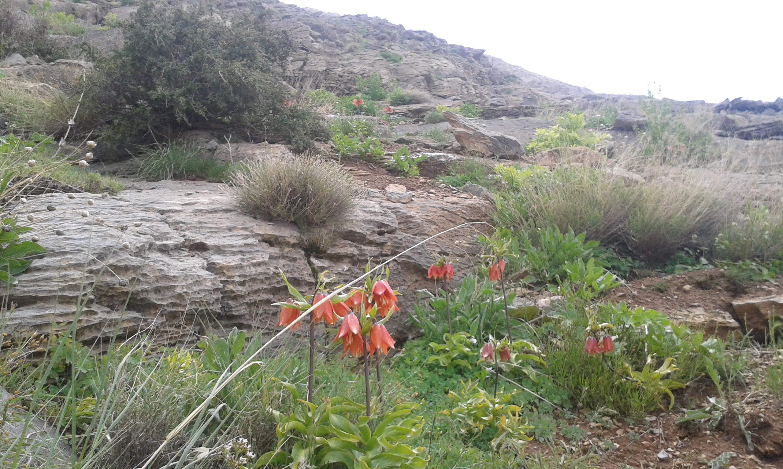 شهرستان اراک